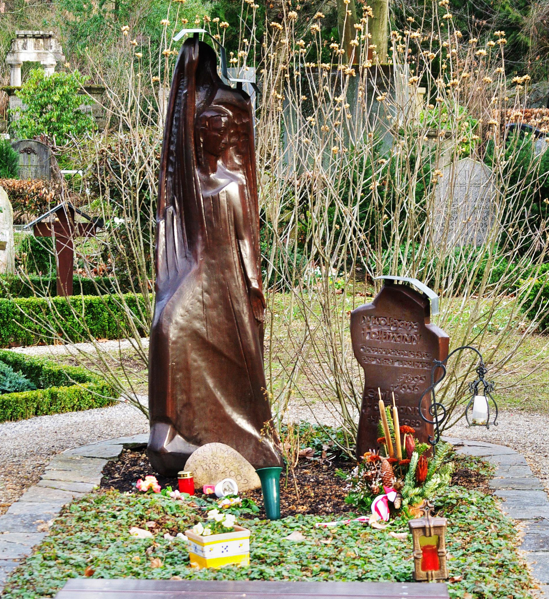 Bilder vom Hauptfriedhof Freiburg